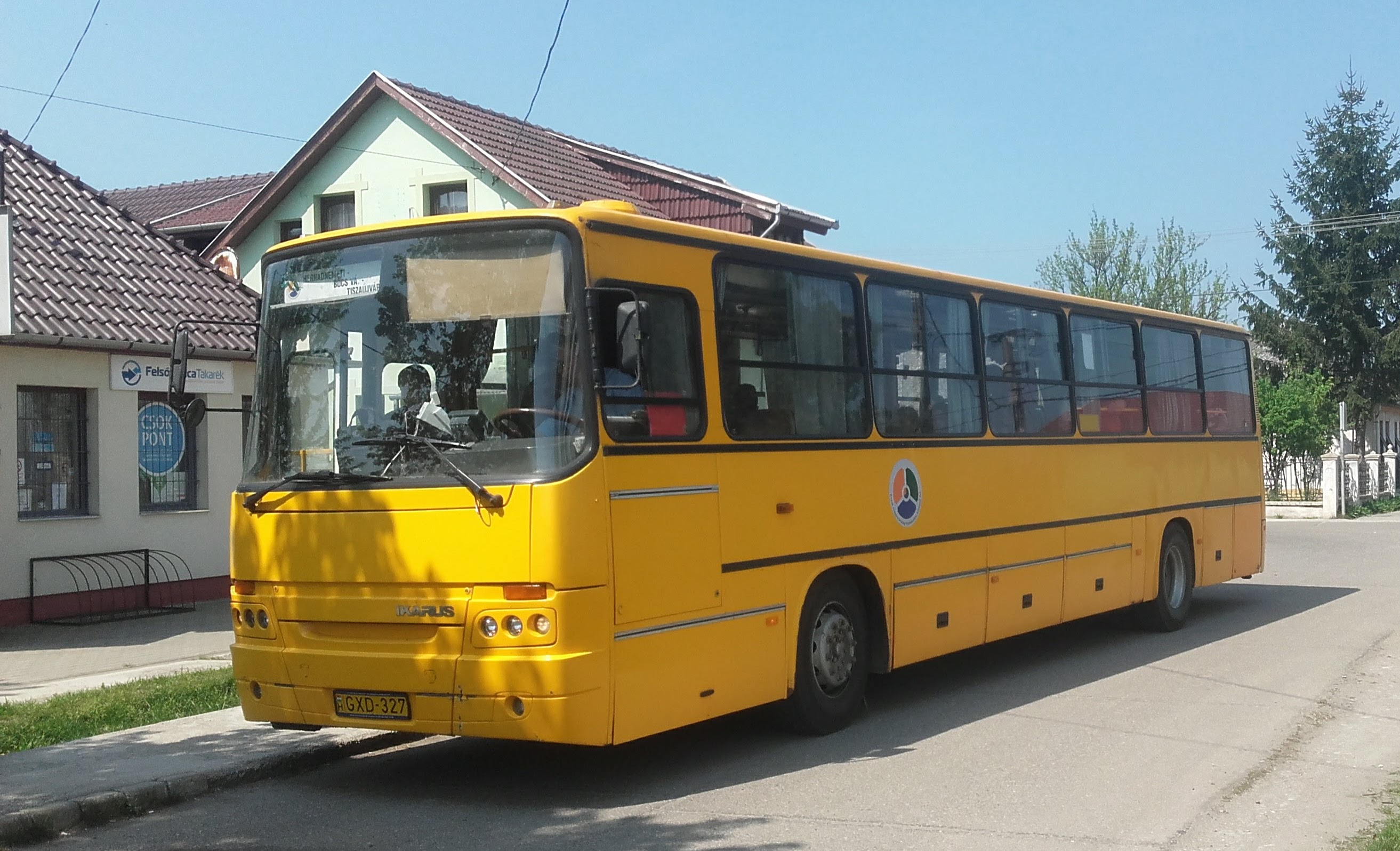 Az ÉMKK GXD-327 rendszámú Ikarus C56 típusú busza Kesznyétenben, a 3731-es helyközi járaton.